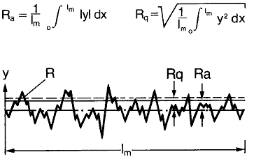 Ra, Rq